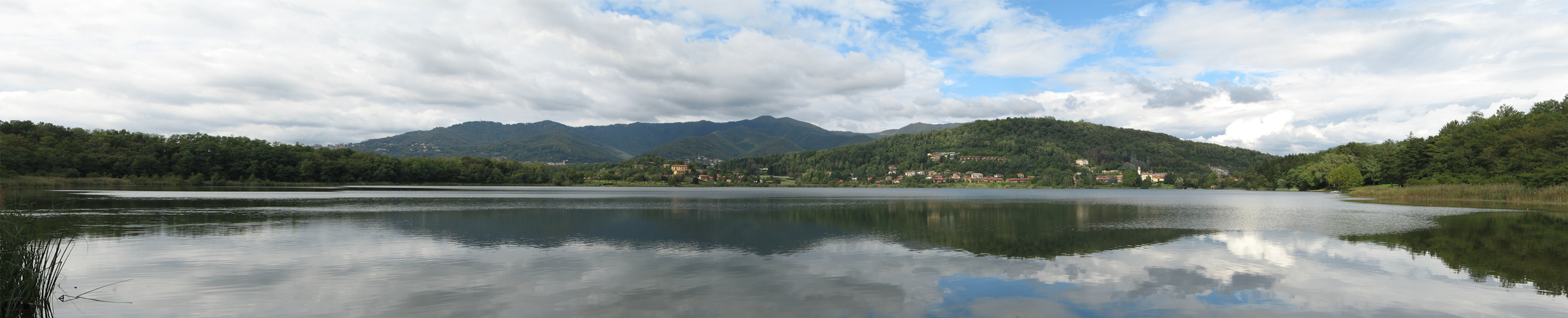 Lago di Montorfano (provincia di Como, Italia)